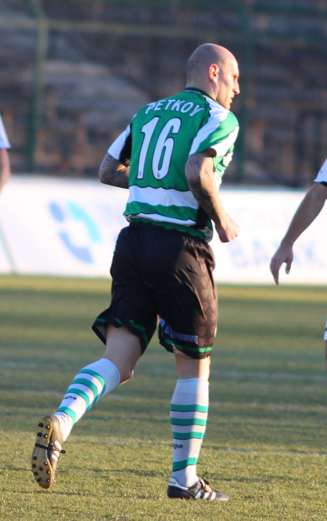 Димитър Петков - български футболист, състезател на Черно море (Варна)